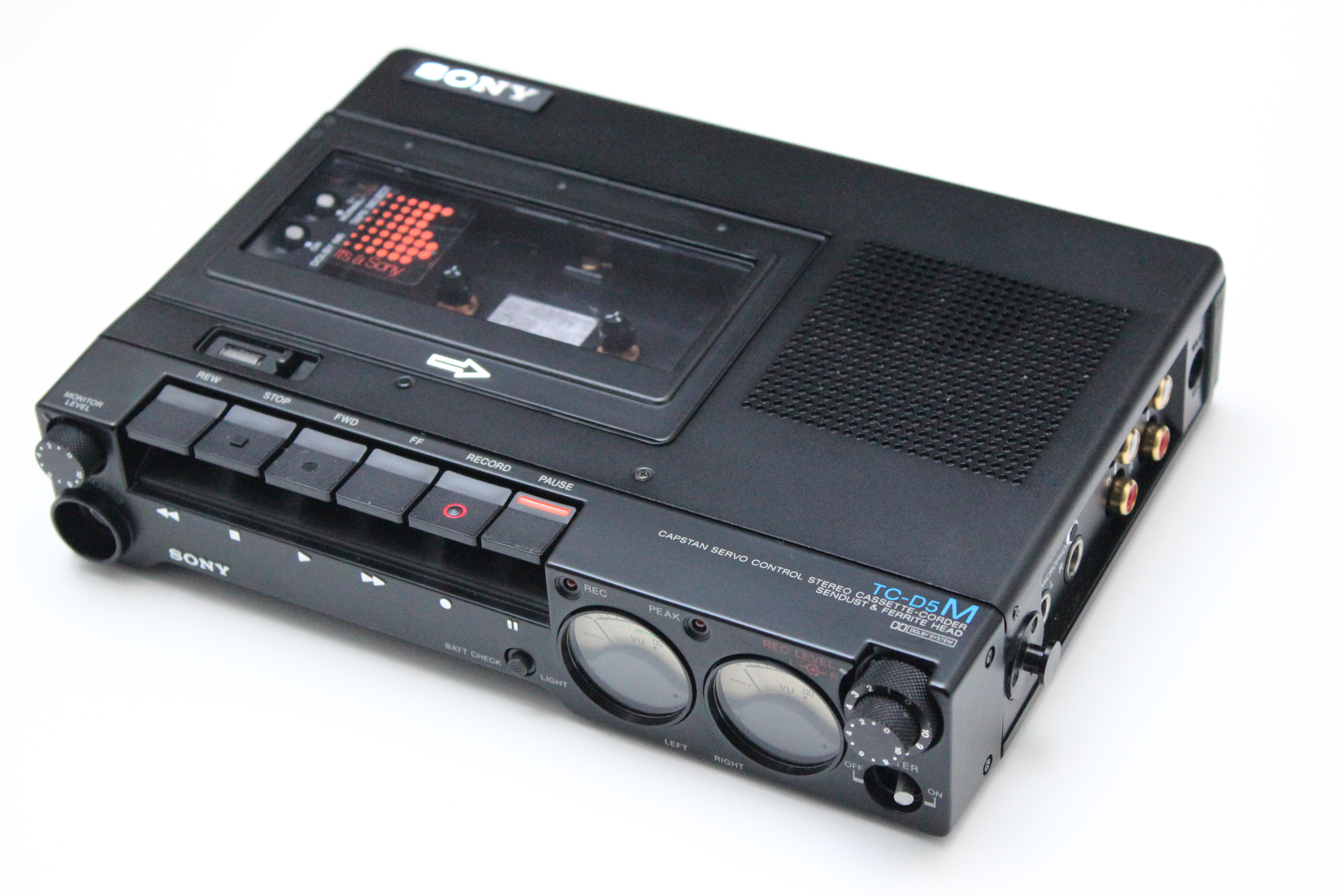 Sony TC-D5M; Front-Right View; Mint Condition; Photo was taken by myself.